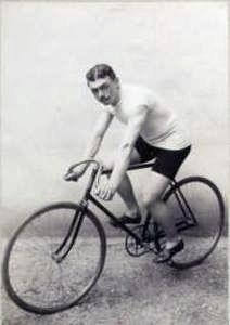 Taillandier, champion amateur vitesse, 1900